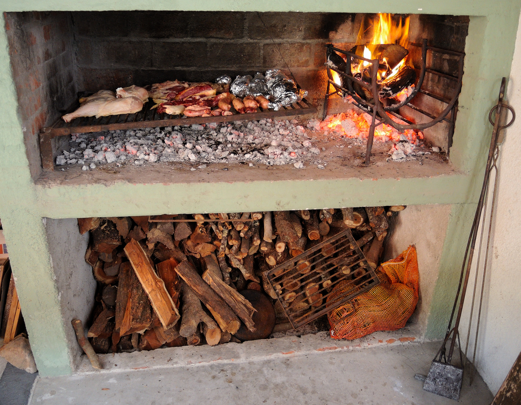 Parrillero completo, típica construcción presente en muchas casas de Uruguay, donde se dispone la parrilla encima y debajo un depósito para la leña.